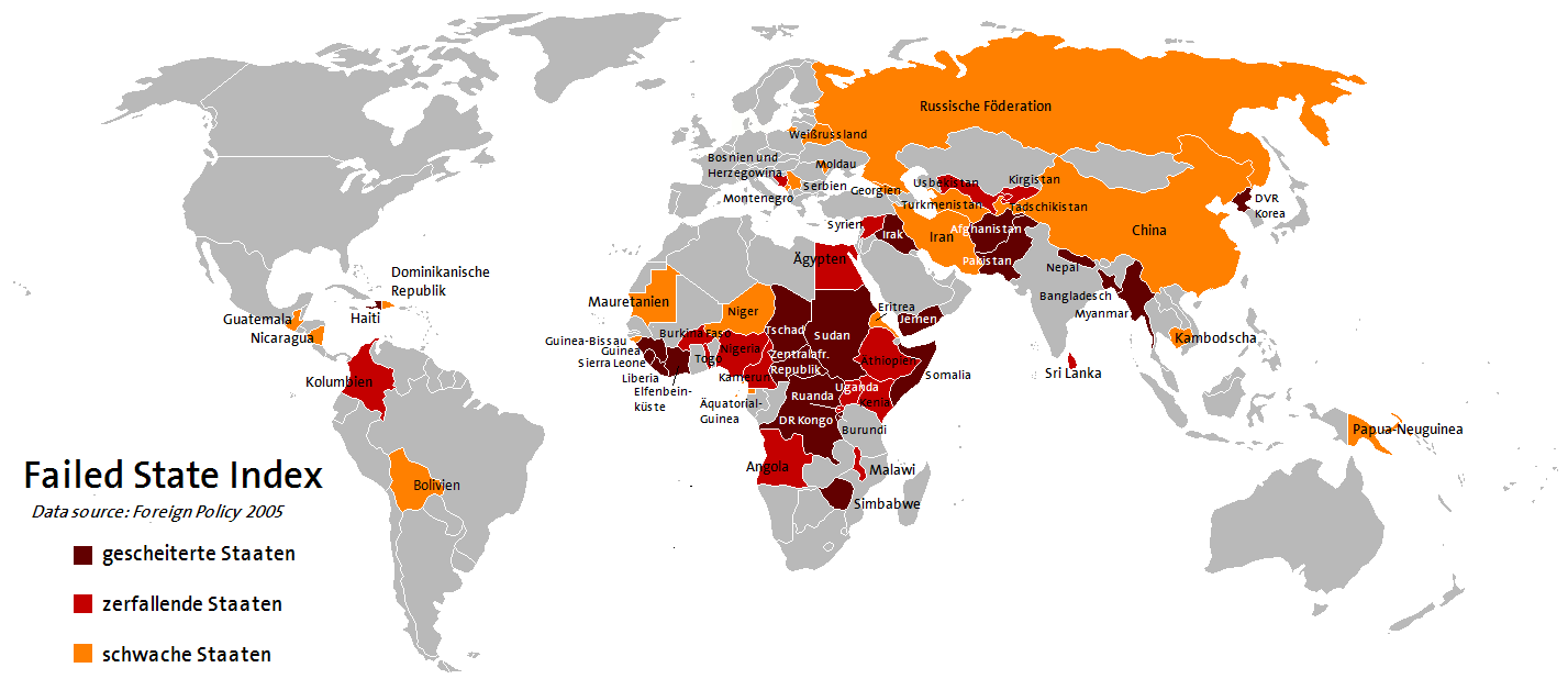 Übersicht über unabhängige Staaten mit Zerfall staatlicher Hoheitgewalt